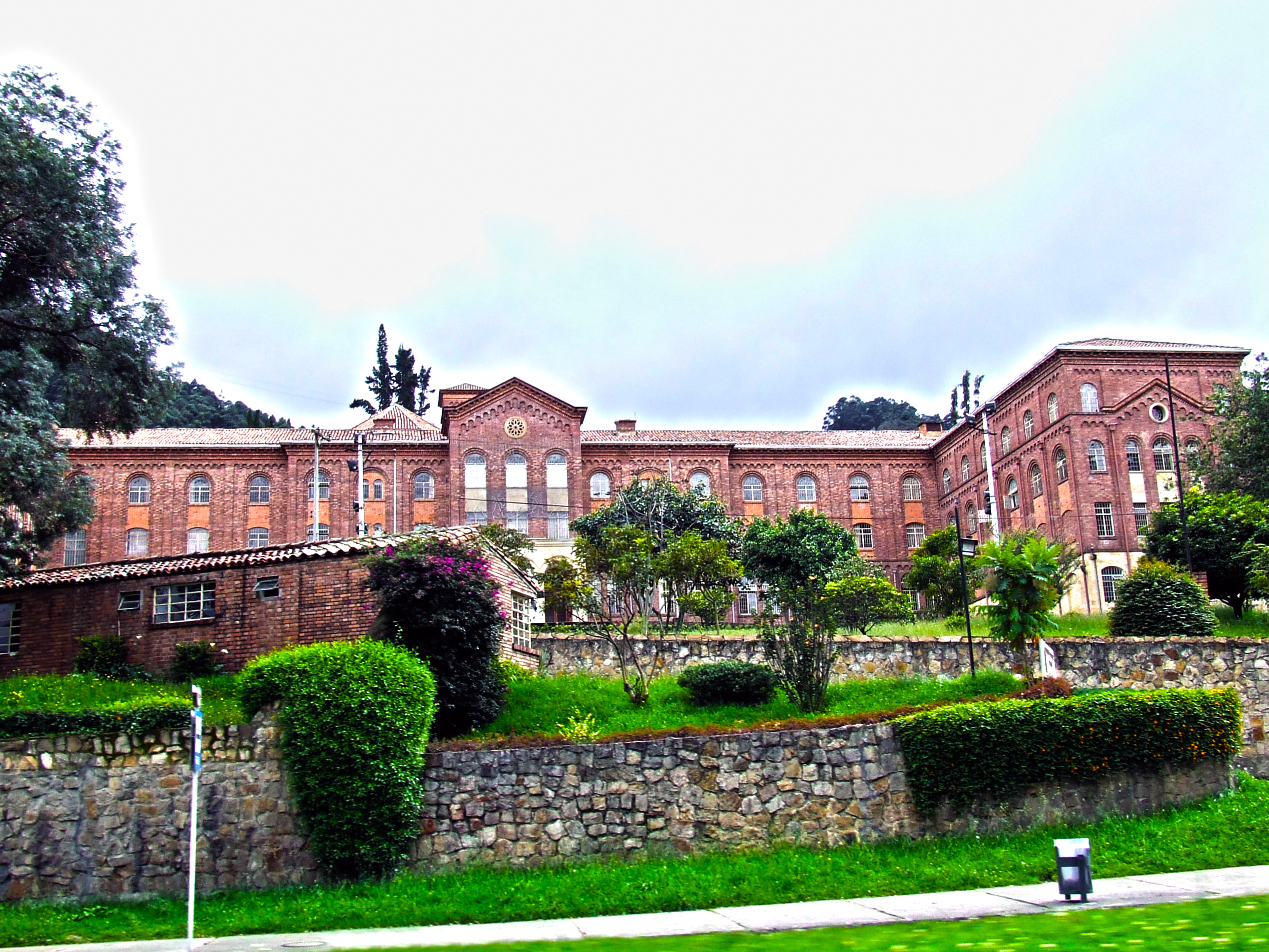 Fundado en 1581 como Seminario de San Luís. 8 años de estudio: 1.Un año introductorio conocido eclesiásticamente como "Propedéutico". 2.Primer año de filosofía. 3.Segundo año de filosofía. 4.Primer año de teología. 5.Segundo año de teología. 6.Año de Pastoral fuera del Seminario (en mitad del ciclo teológico) 7.Tercer año de teología. 8.Cuarto año de teología.